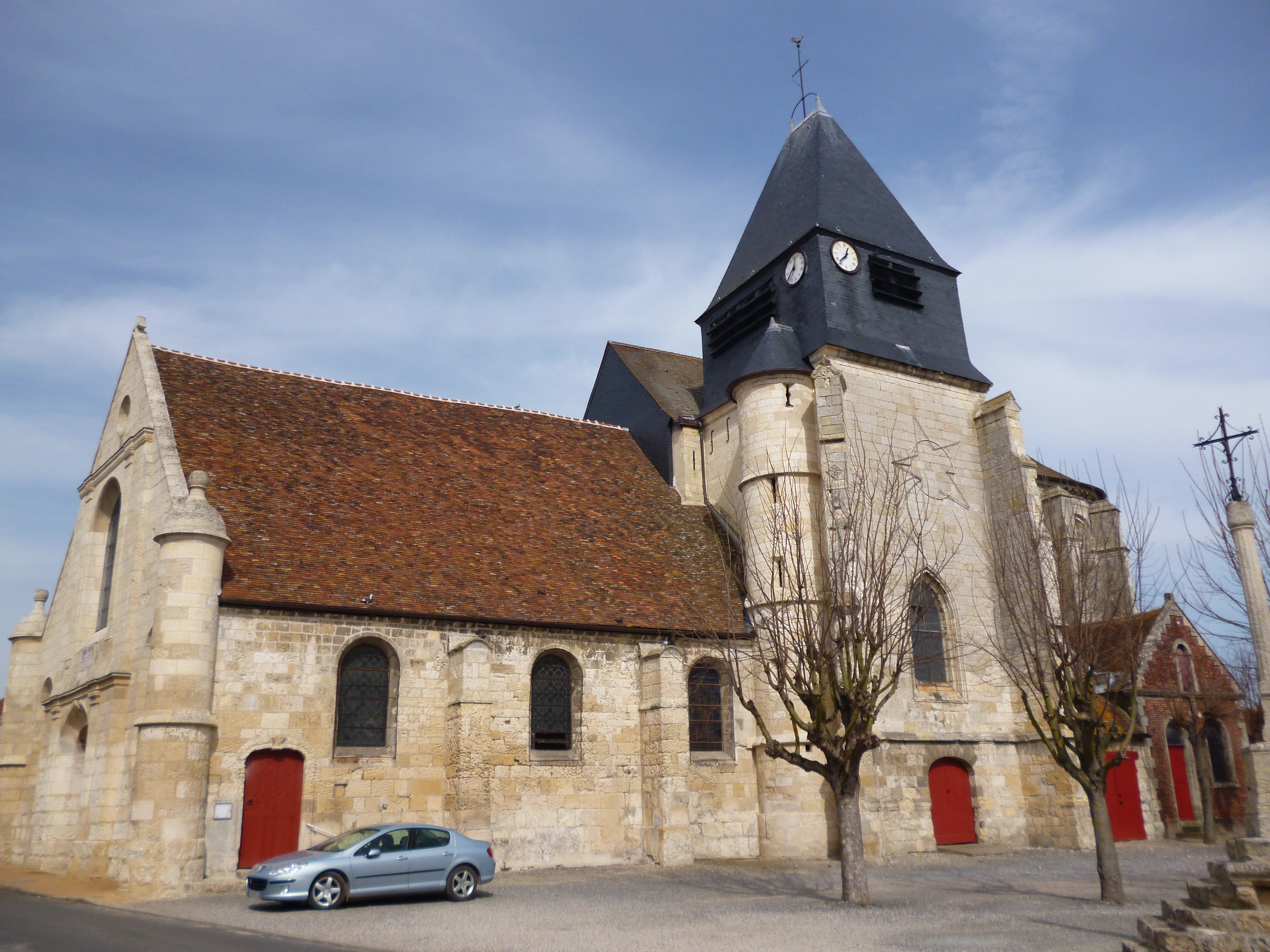 Eglise de La Neuville-Roy (Oise, 60) inscrite sur la liste des monuments historiques de France, depuis le 14 septembre 1949, sous la référence PA00114779. .